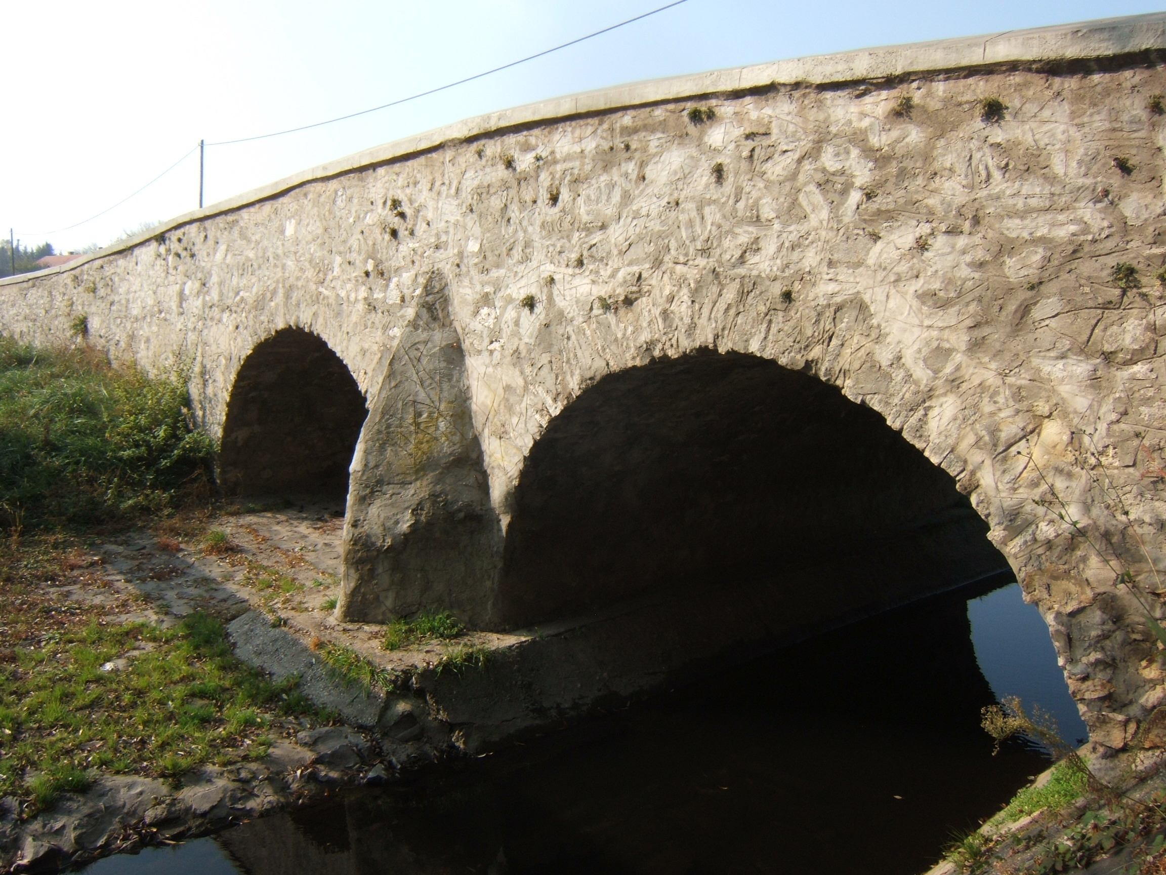 Káptalanfa, híd